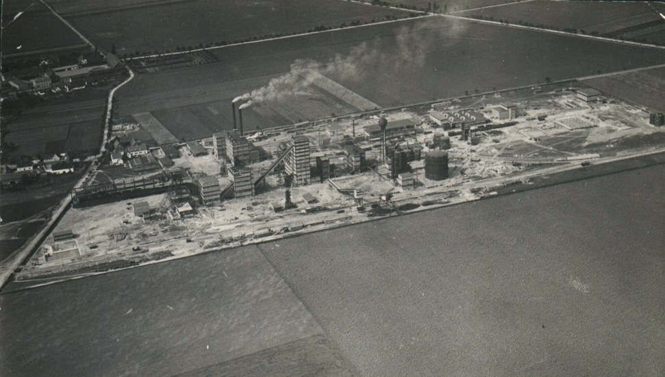 Luftbild vom Schwelwerk Gölzau 1928